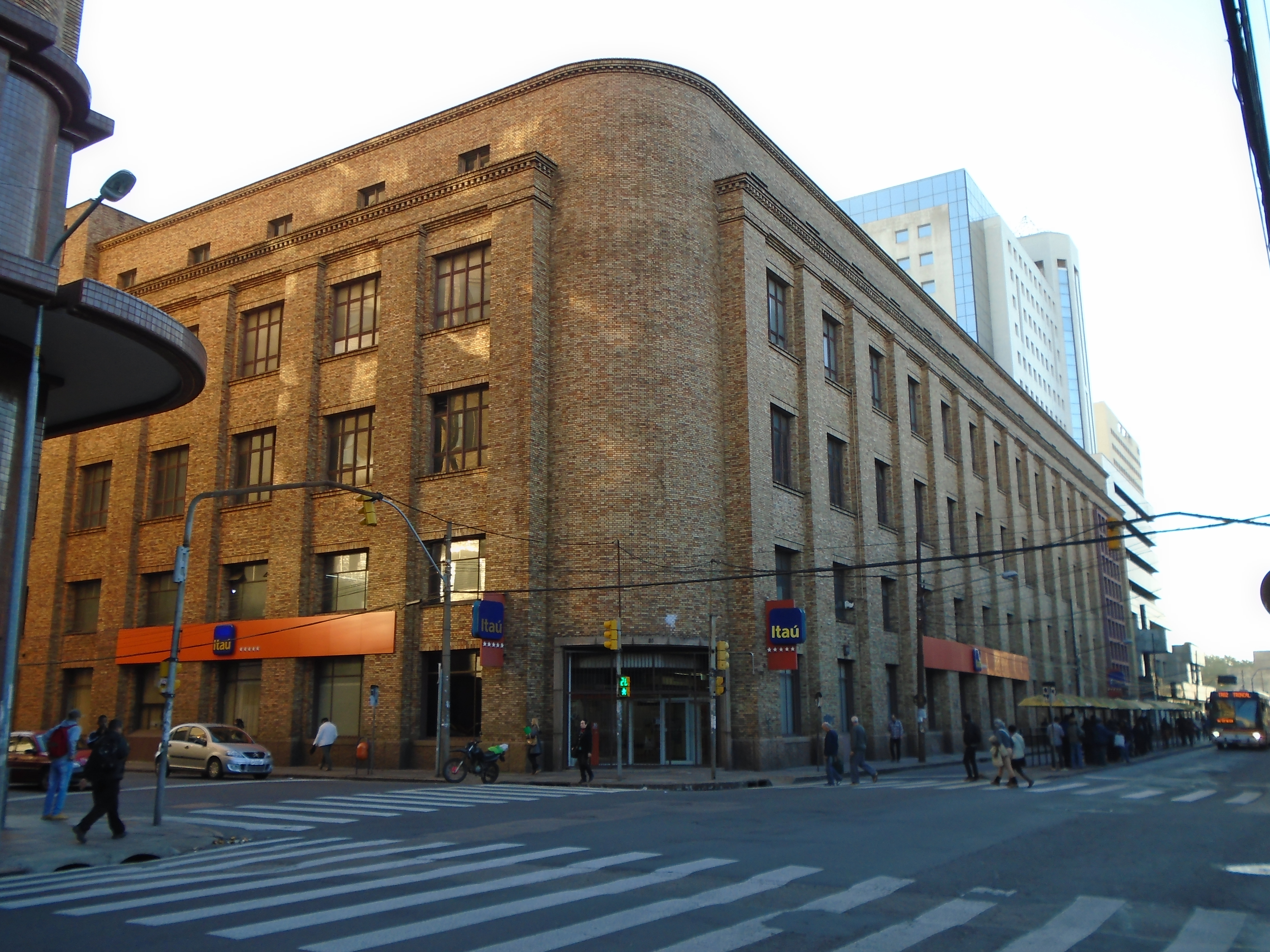 Rua Comendador Manoel Pereira, 90 (Porto Alegre, Brasil)